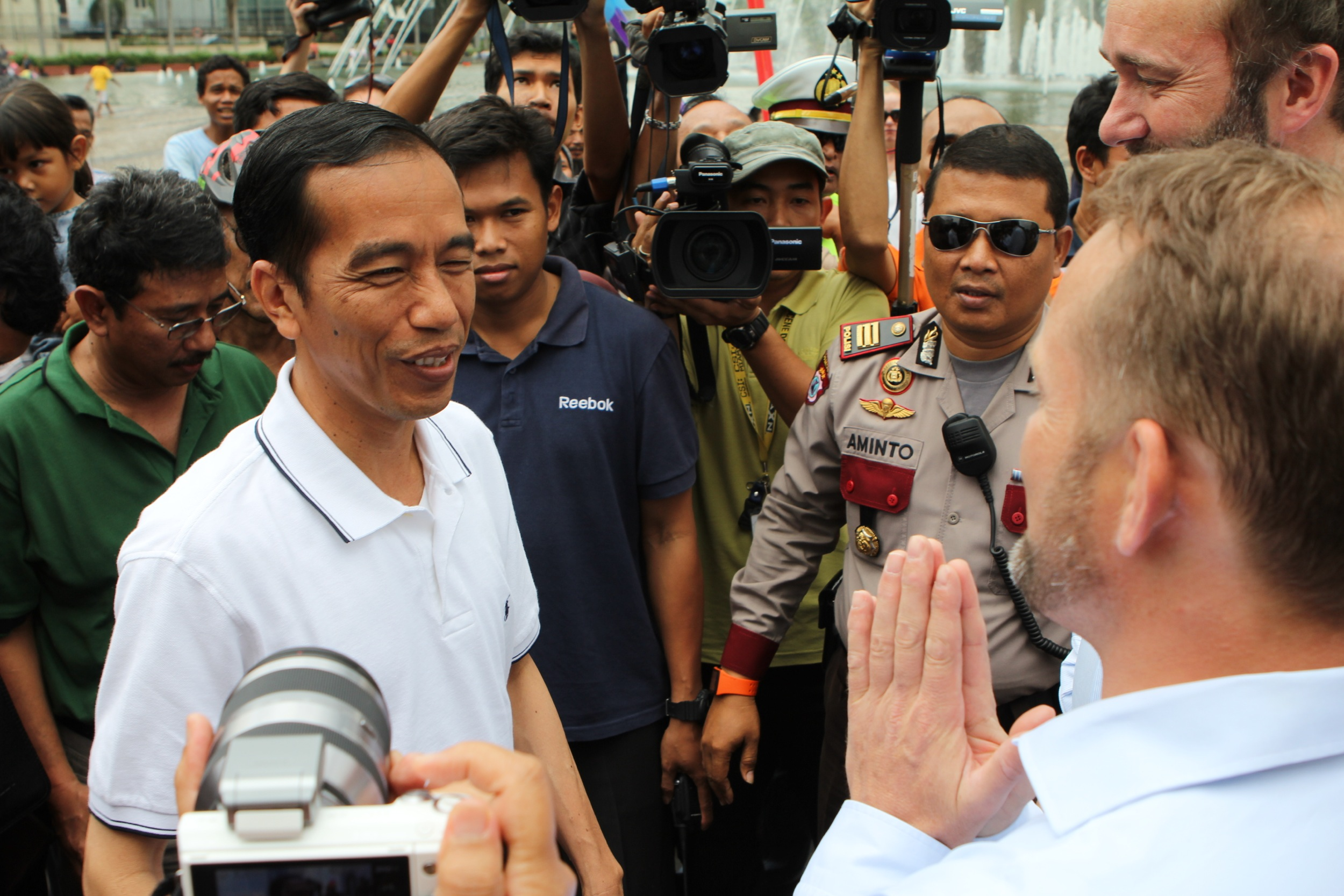 Foto: Øystein Solvang/NHD